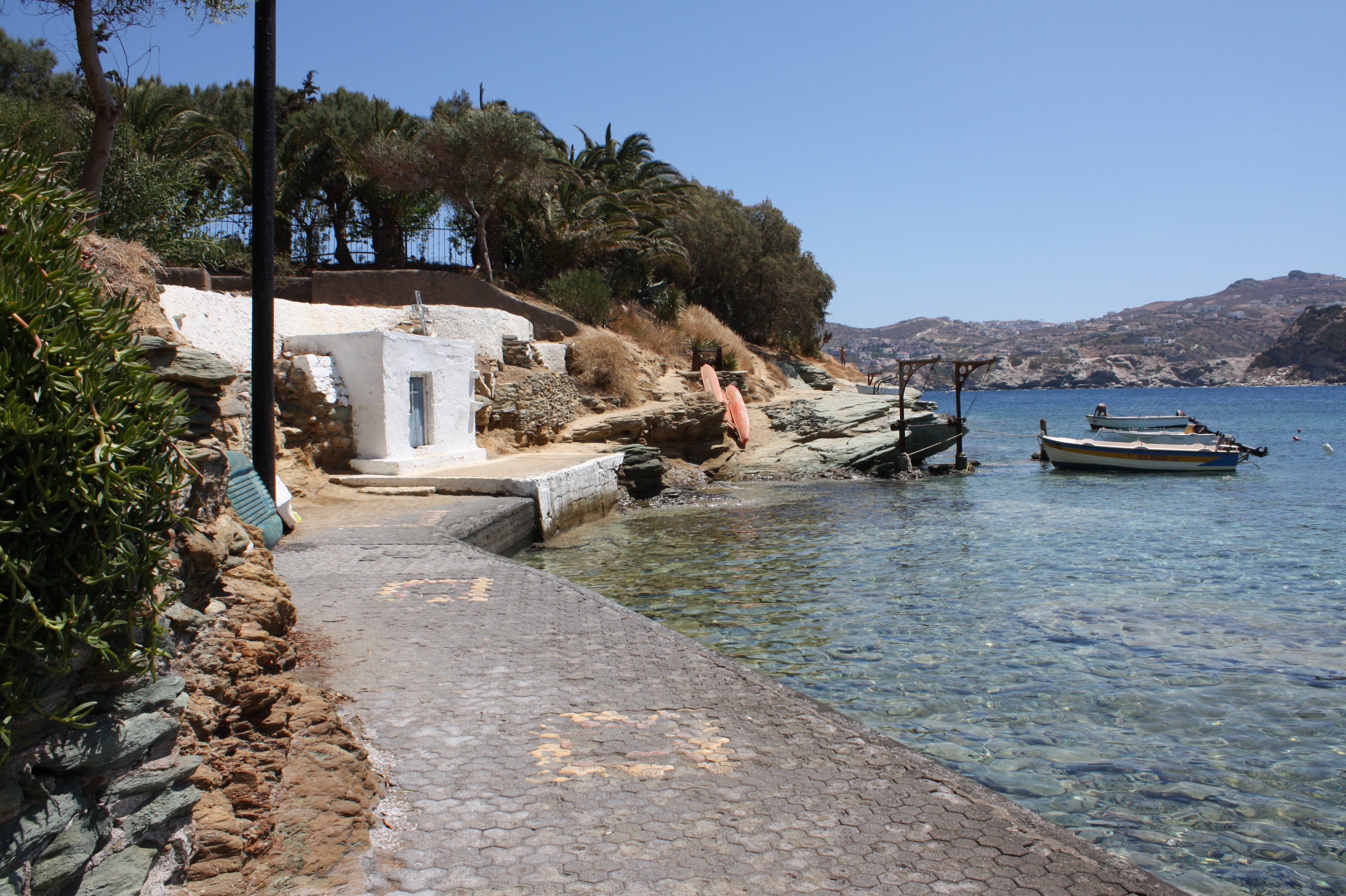 Agia Pelagia Beach of Agia Pelagia, Crete